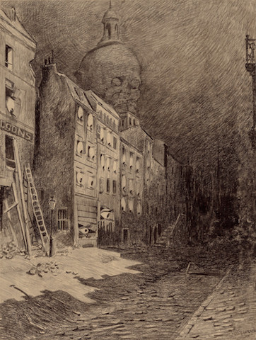 War of the worlds illustration by Henrique Alvim Corrêa